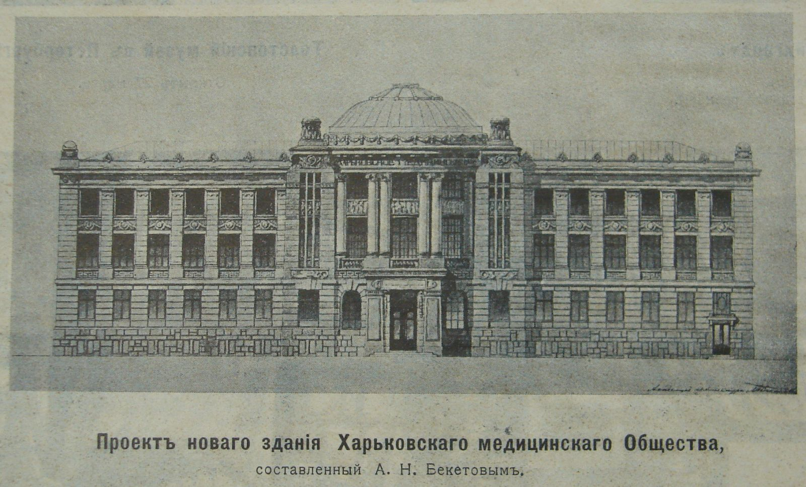 Дворец медицины (проект) - здание харьковского медицинского общества (1911).